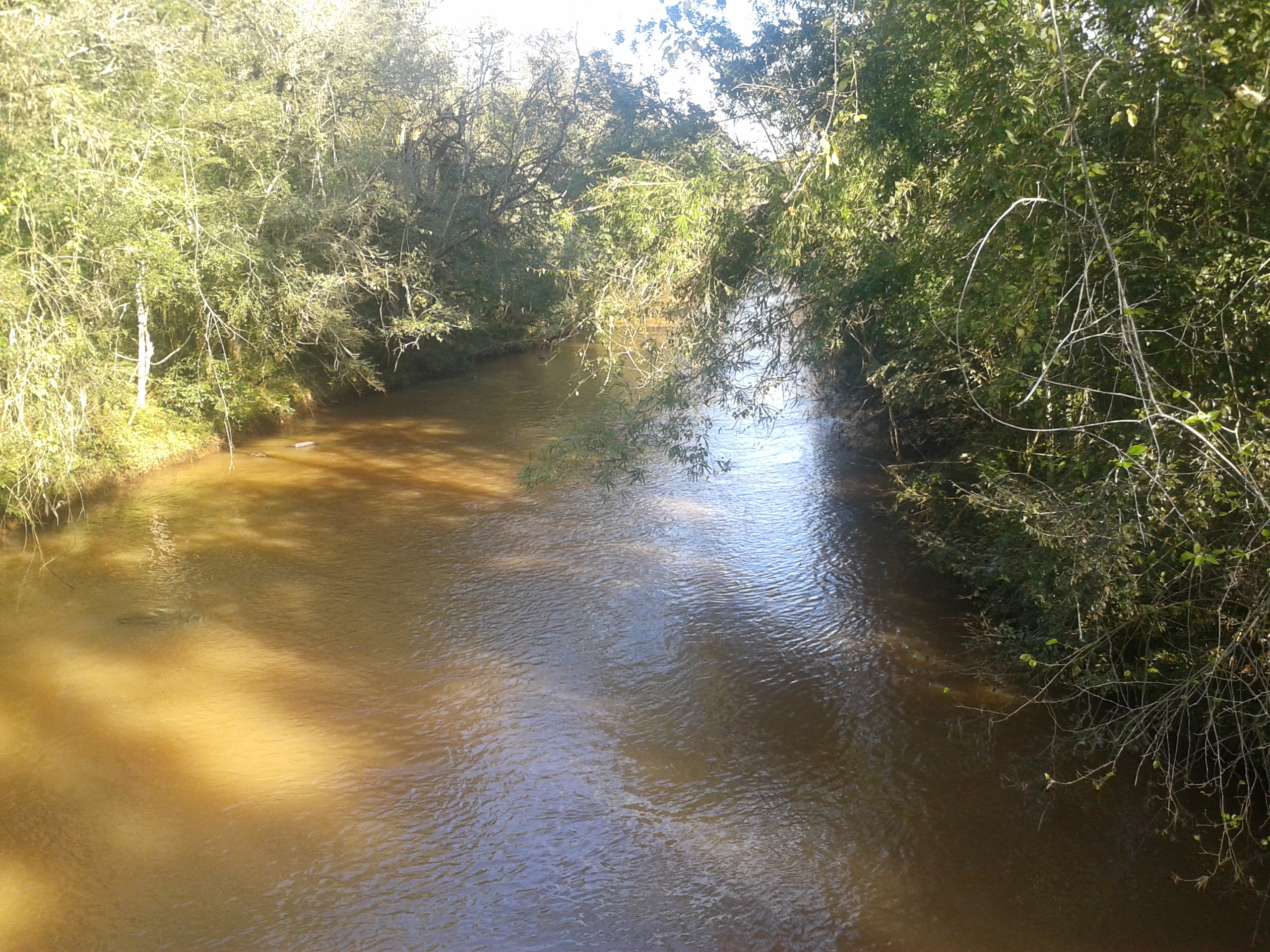 Rio Lageado Grande.